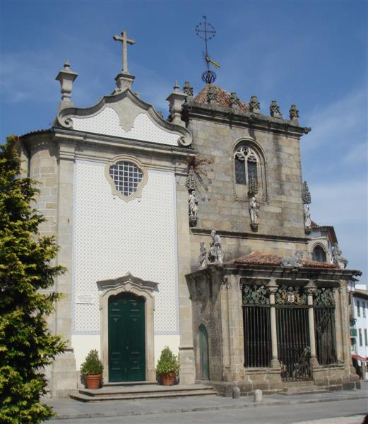 S. Joao do Souto Church, in Braga, Portugal